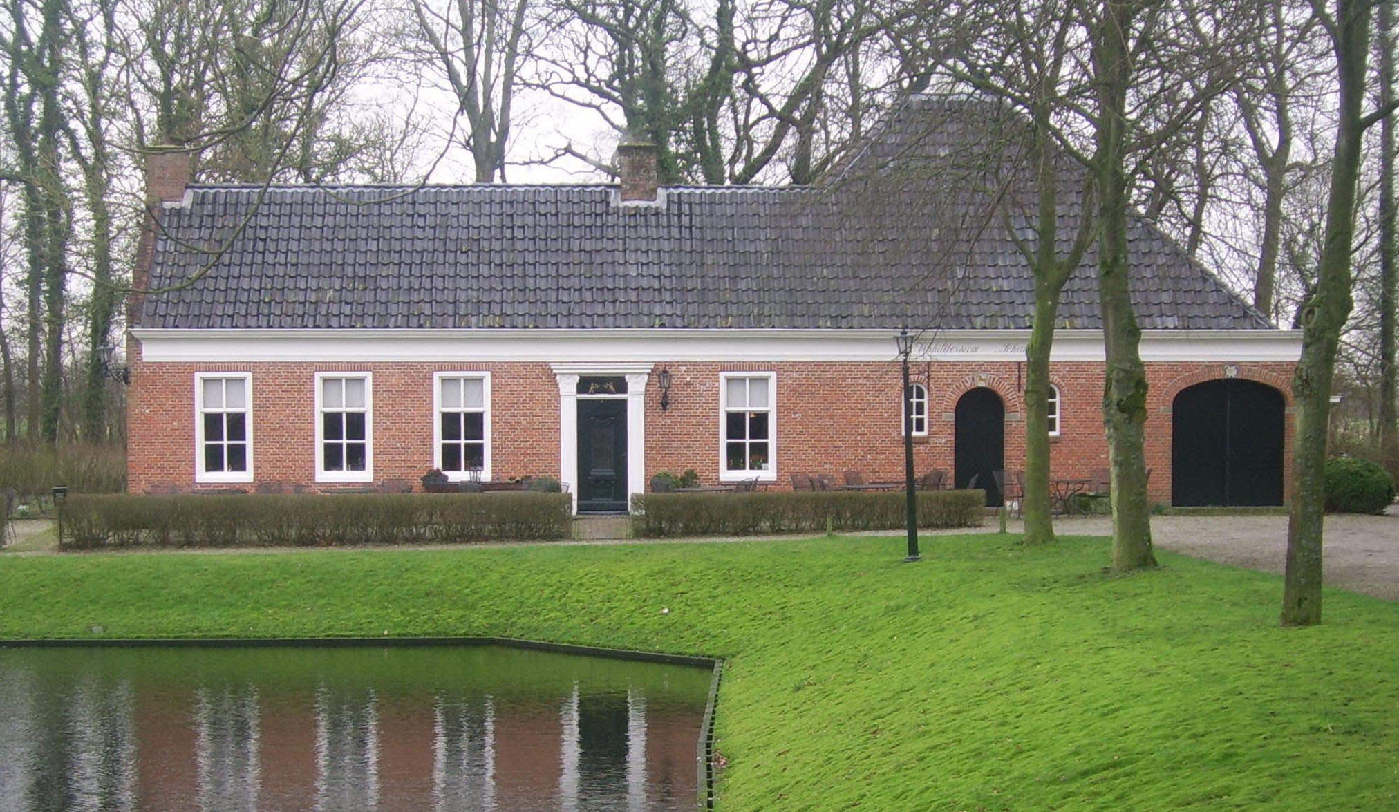 Verhildersum, Schathuus (oorspronkelijk van de Saaksumborg, herbouwd bij Verhildersum in 1972)